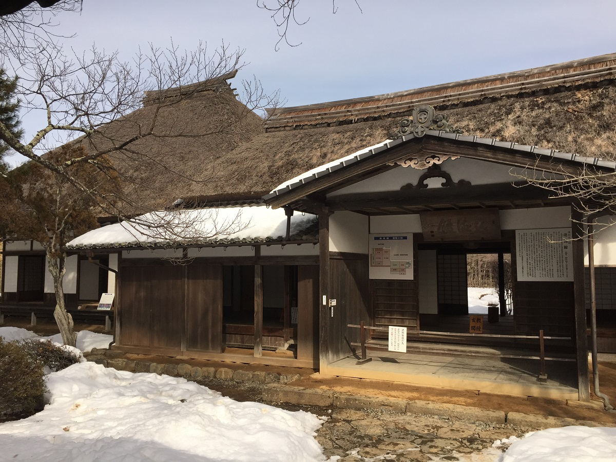 信濃国高遠藩の藩校である進徳館、現在の様子